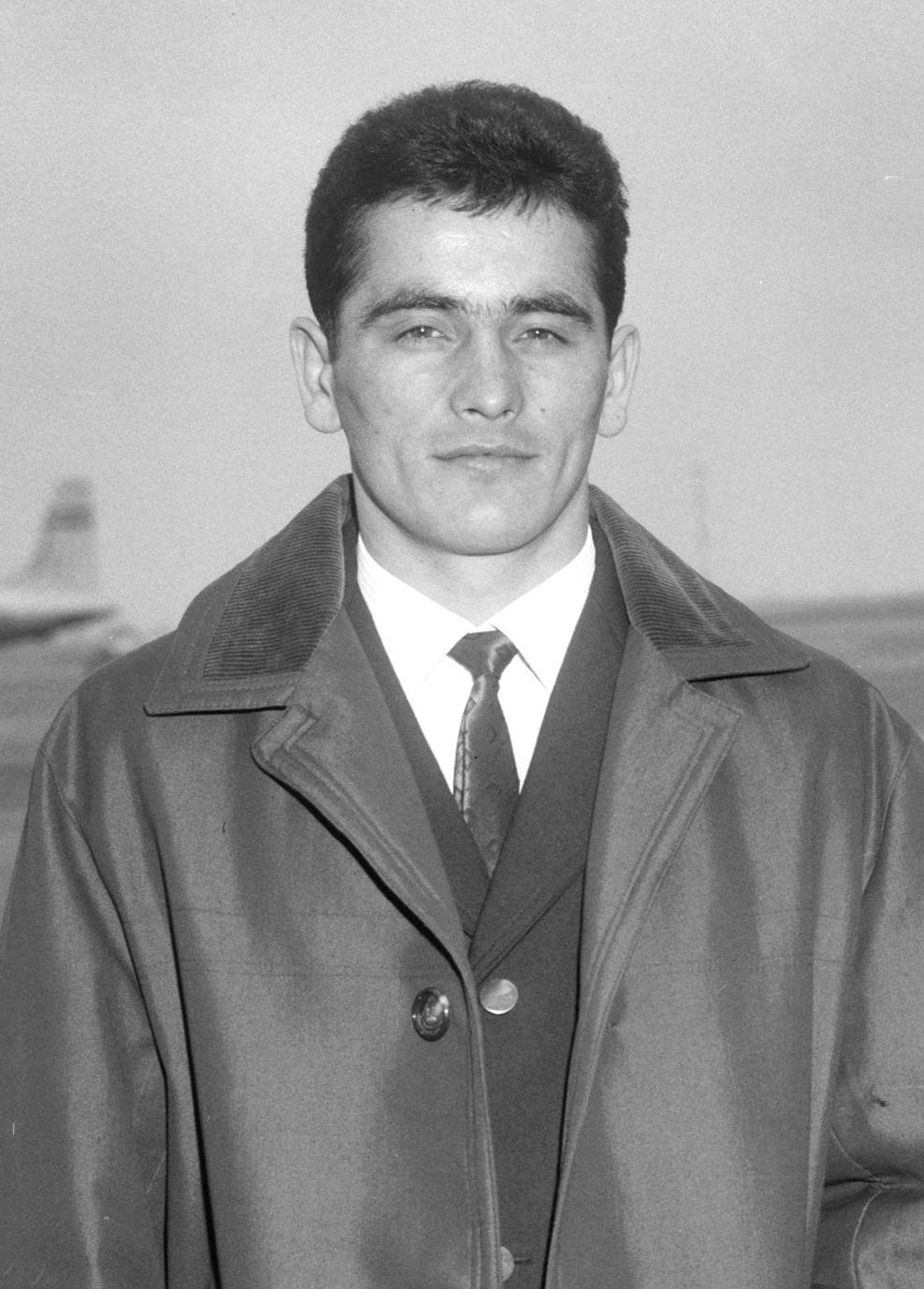 Aankomst boksploegen op Schiphol, de Hongaarse ploeg, János Kajdi